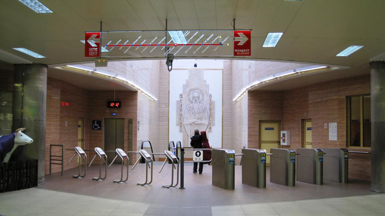 Kliment Ohridski metrostation